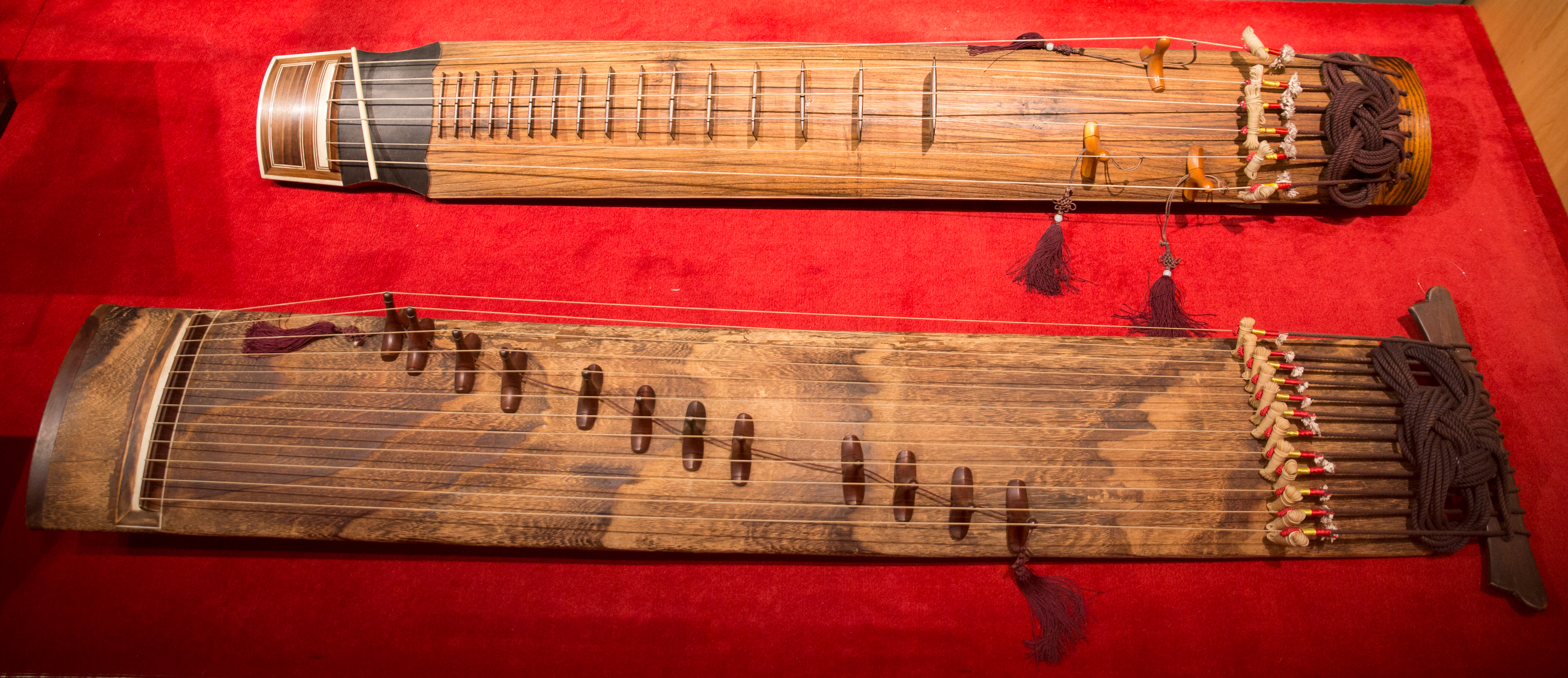 Geomungo i Jeongak gayageum, exposat a Eolssigu! Els sons de Corea